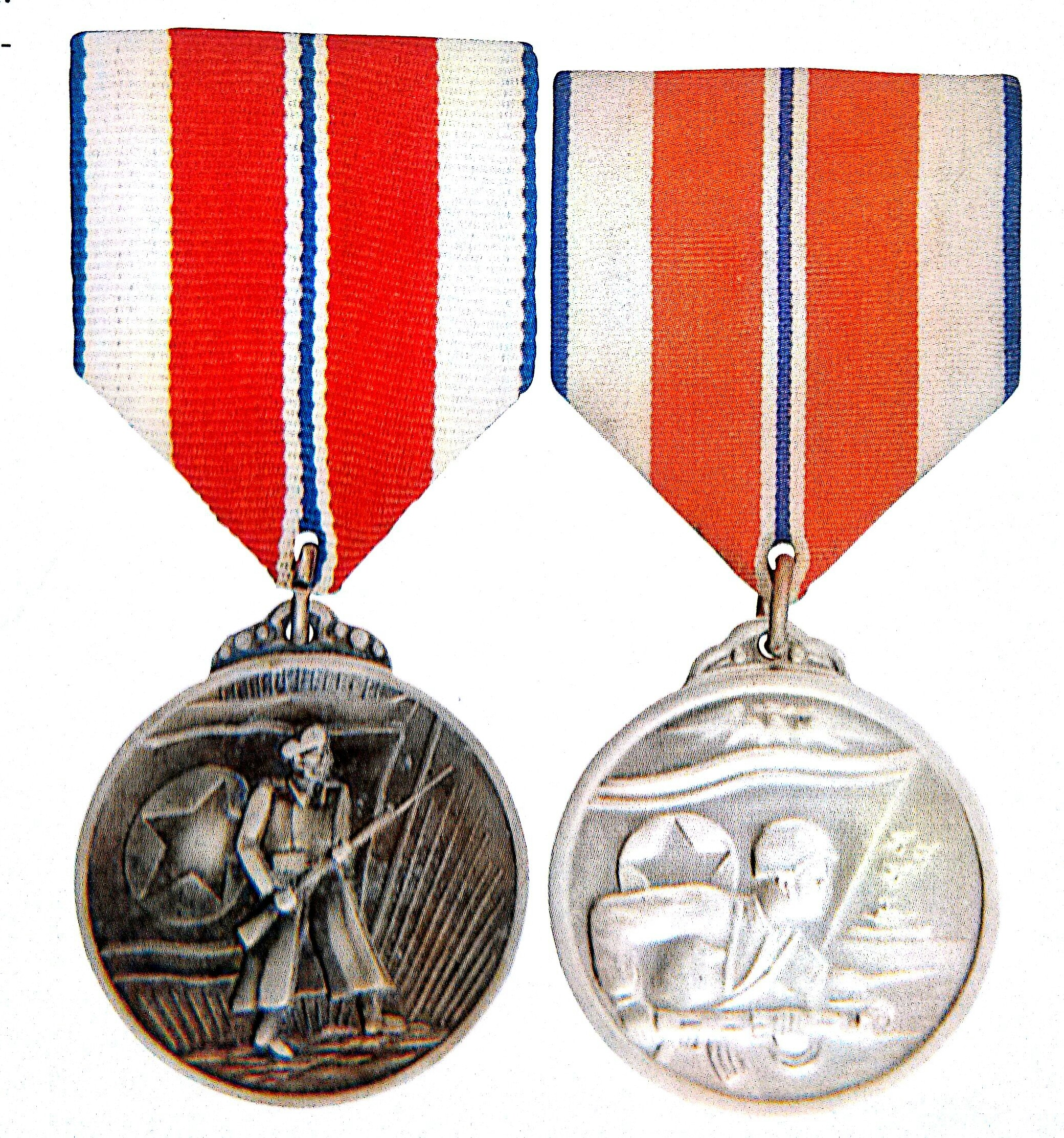 2 variation